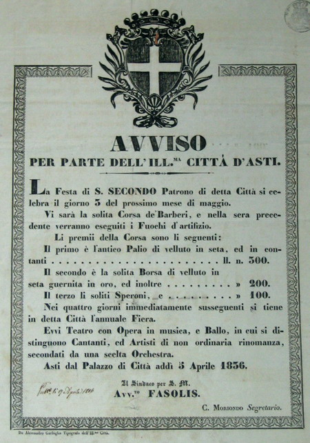 Palio di Asti, Manifesto dell'800 per la Corsa e per le Festività di San Secondo ..